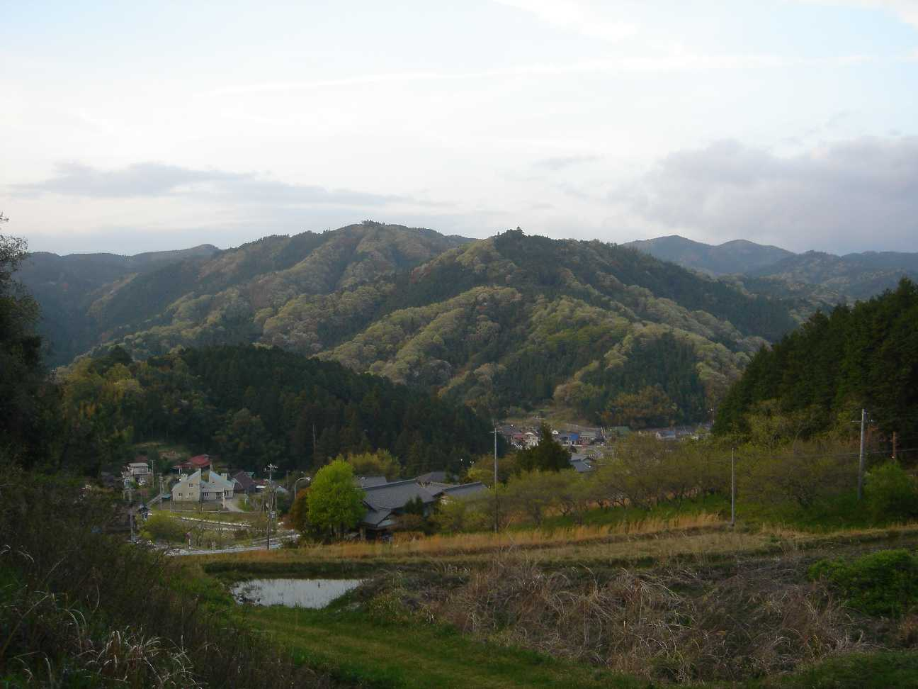 Hügellandschaft in Sakuragata in Okazaki (früher Nukata)